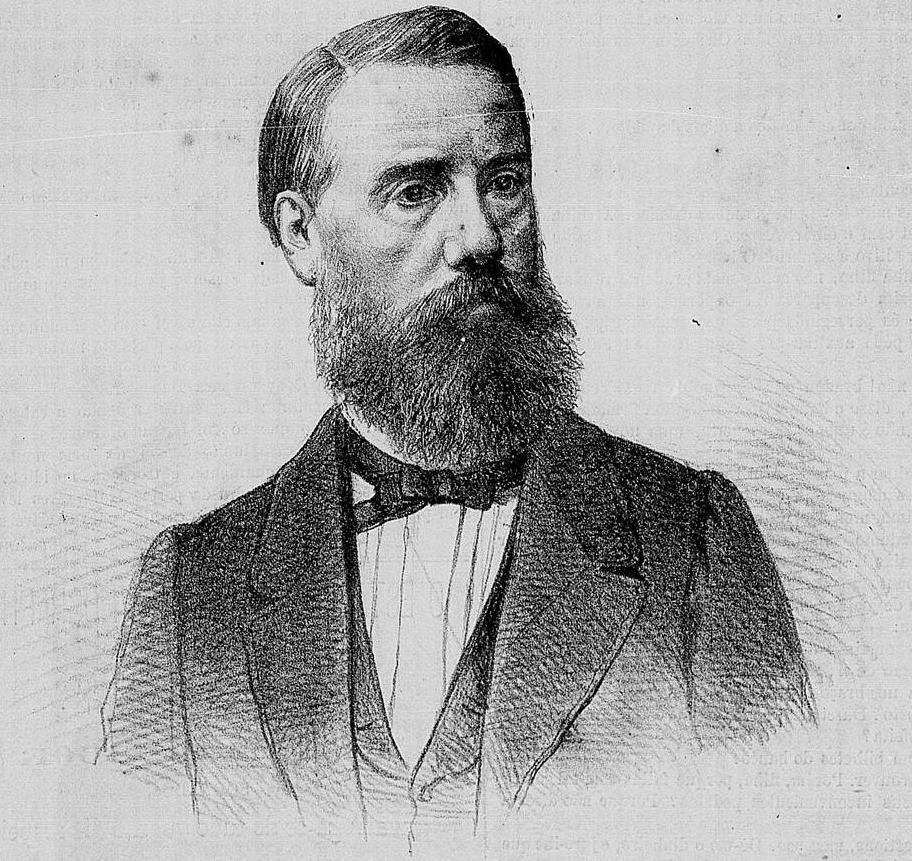 Faustino Xavier de Novaes.